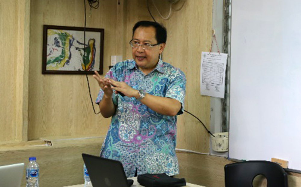 Ir. Drs. Djohan Yoga, M.Sc., MoT, Ph.D. ketika mengisi pelatihan Strategi Implementasi Kurikulum melalui Mind Map Based Learning di Kedutaan Besar Republik Indonesia Bangkok. Kegiatan ini diselenggarakan oleh Atase Dikbud KBRI Bangkok tanggal 22-23 Maret 2019.